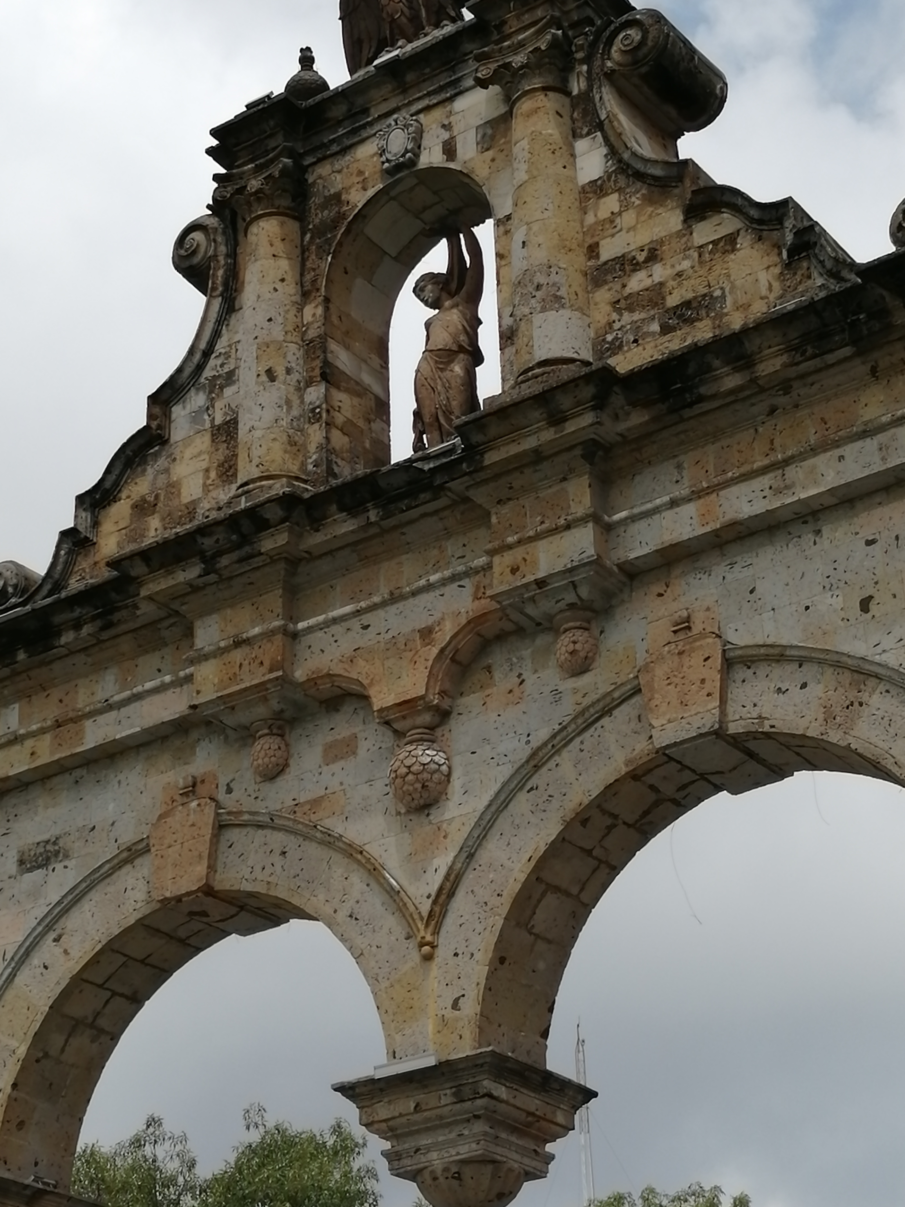 Arco de Ingreso de Zapopan al frente..jpg